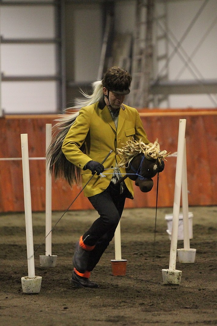 Bikarkeppnin í Mánahöll